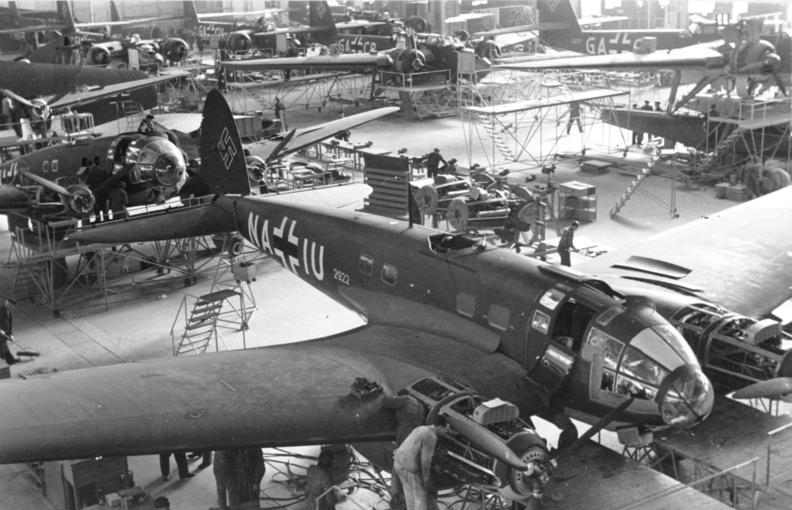 Information added by Wikimedia users.Bau des Bombers Heinkel He 111 P-4 (vorne NA+IU, Werksnummer 2922), dahinter ist die Produktion des Wasserflugzeugs Heinkel He 115 zu sehen (u.a. GA+CR). Die He 111 P-4 wurde 1939/40 ausgeliefert und hatten die Werksnummern 2906 - 3129. 2922 war also die 17. He 111 P-4, Datum der Aufnahme daher wohl 1939.